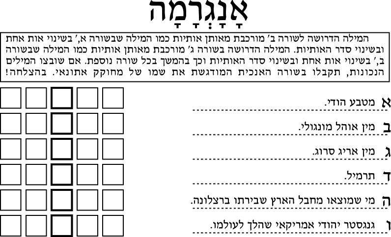 anagrama